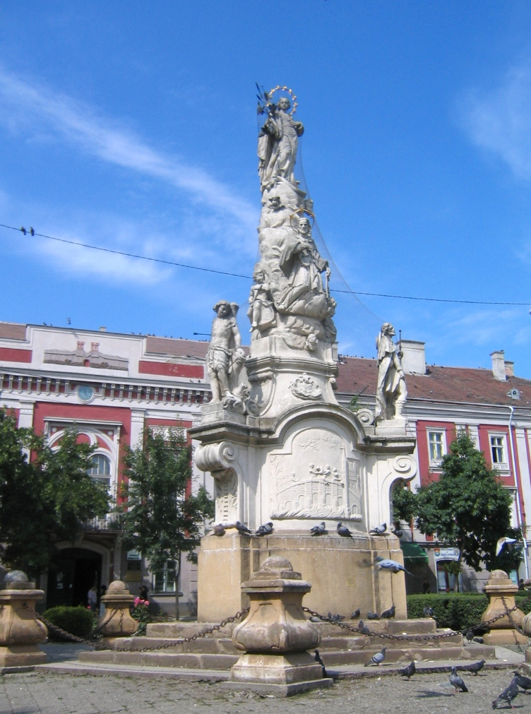 Monument Piaţa Libertăţii (Timişoara).